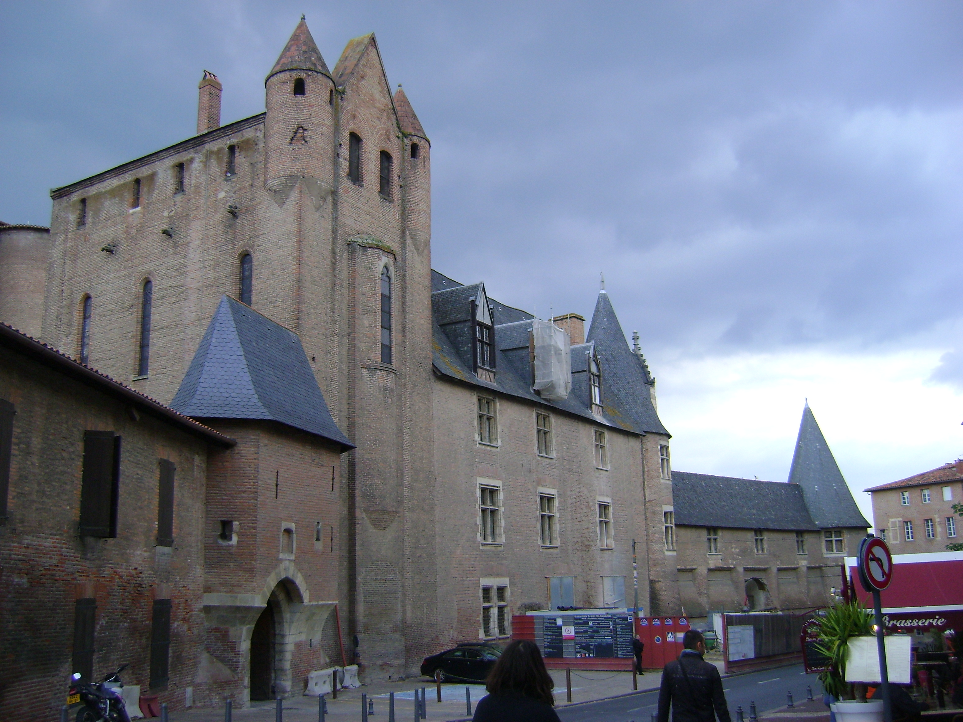 Palais de l'Archevêché ou de la Berbie, Albi, Tarn. Façade Est. .